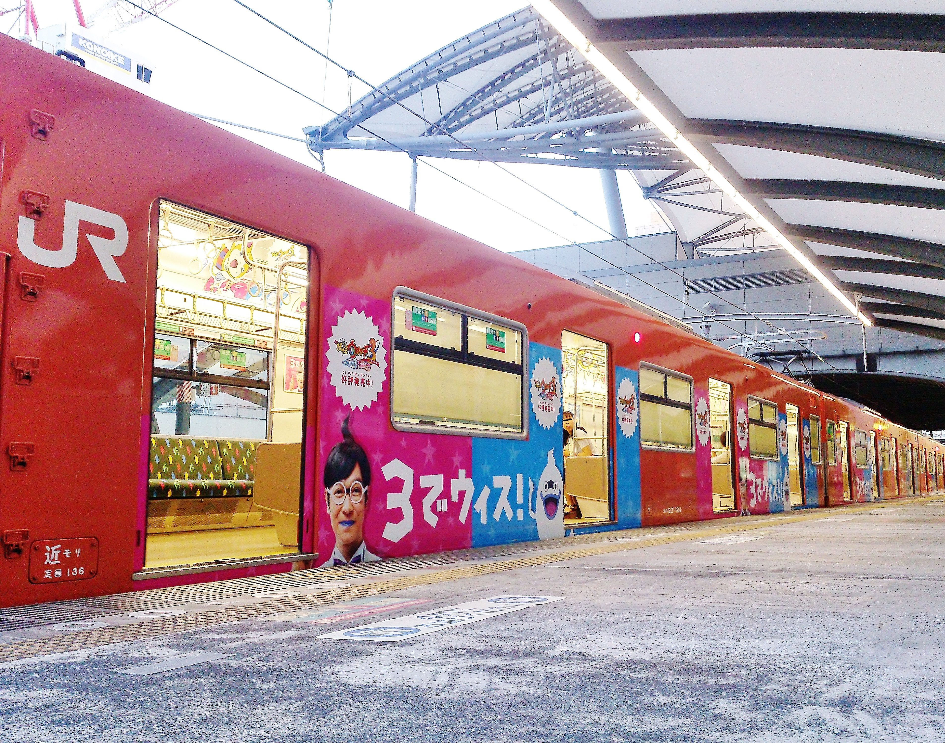 大阪市此花区 ユニバーサルシティ にて撮影